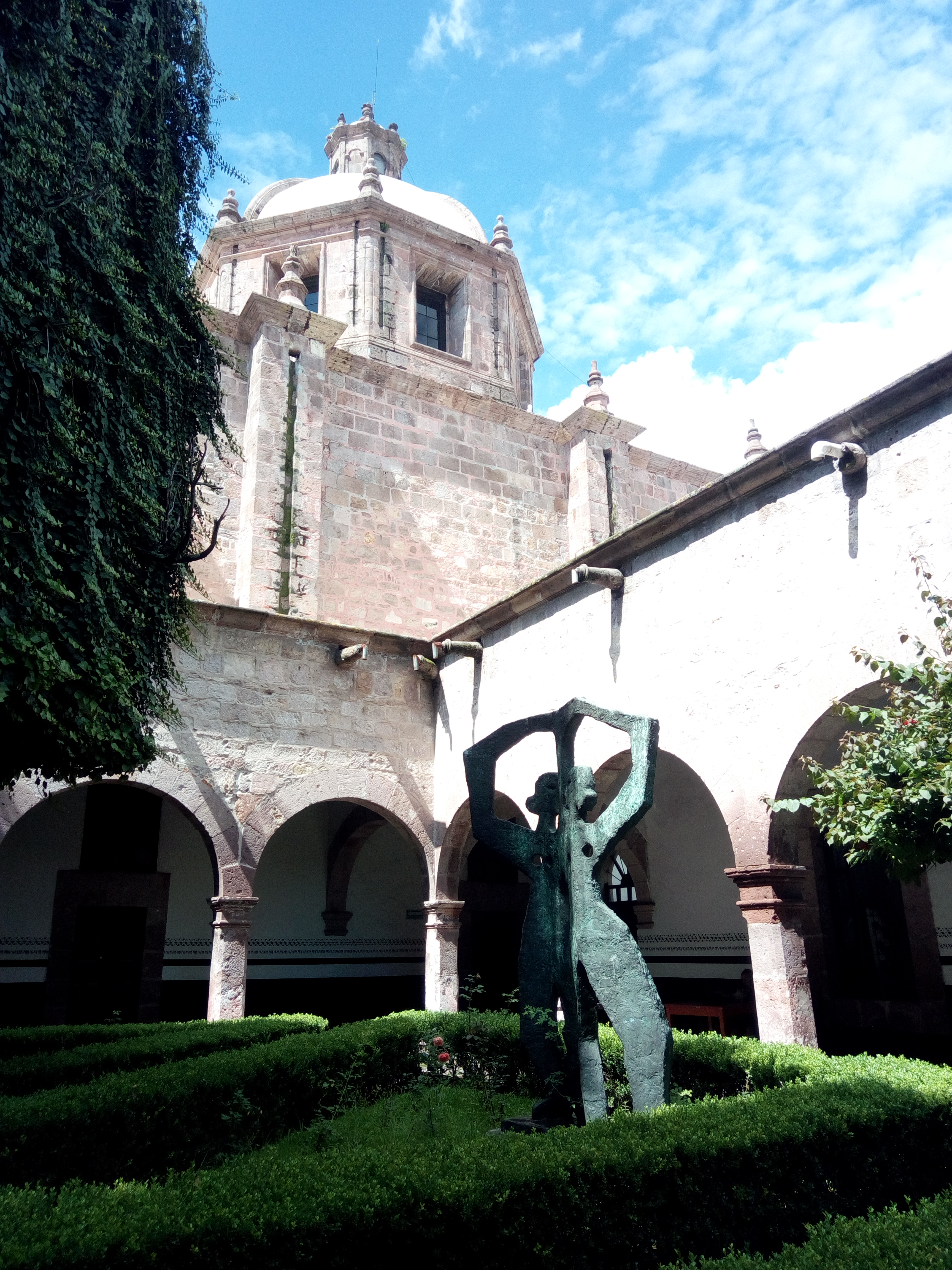 Interior del Conservatorio de las Rosas, al fondo el Templo de las Rosas